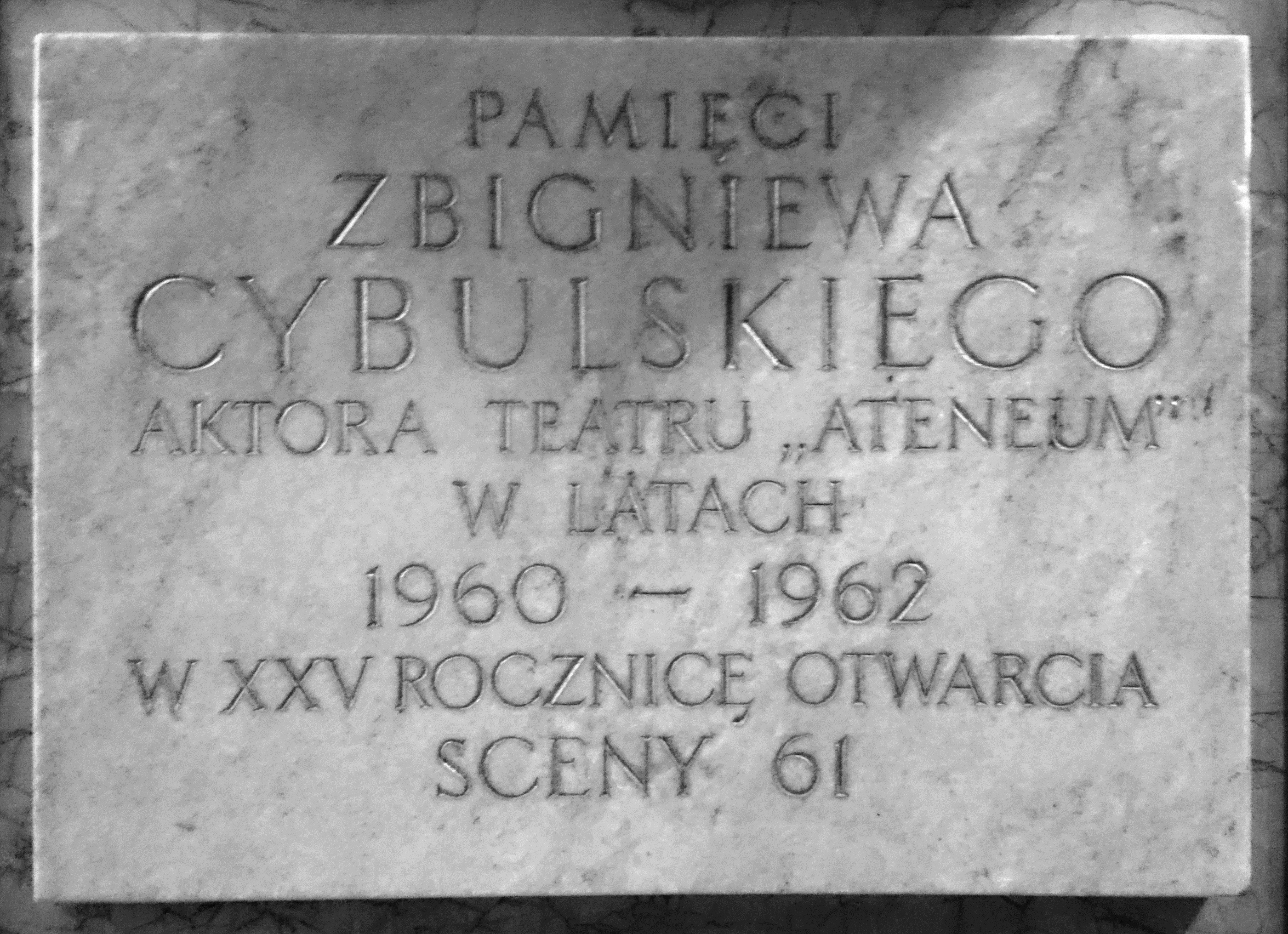 Tablica poświęcona Zbigniewowi Cybulskiemu w kuluarach Teatru Ateneum w Warszawie